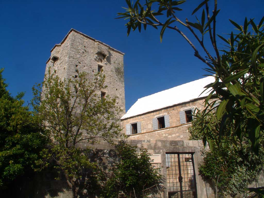 Škrip village, Brač island, Croatia. K. Korlević